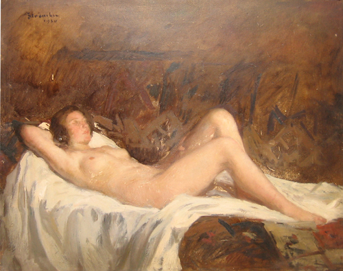 Ipolit Strâmbu - Nud, ulei pe carton, semnat, datat 1930 stânga sus, 49,5x60,5 cm.